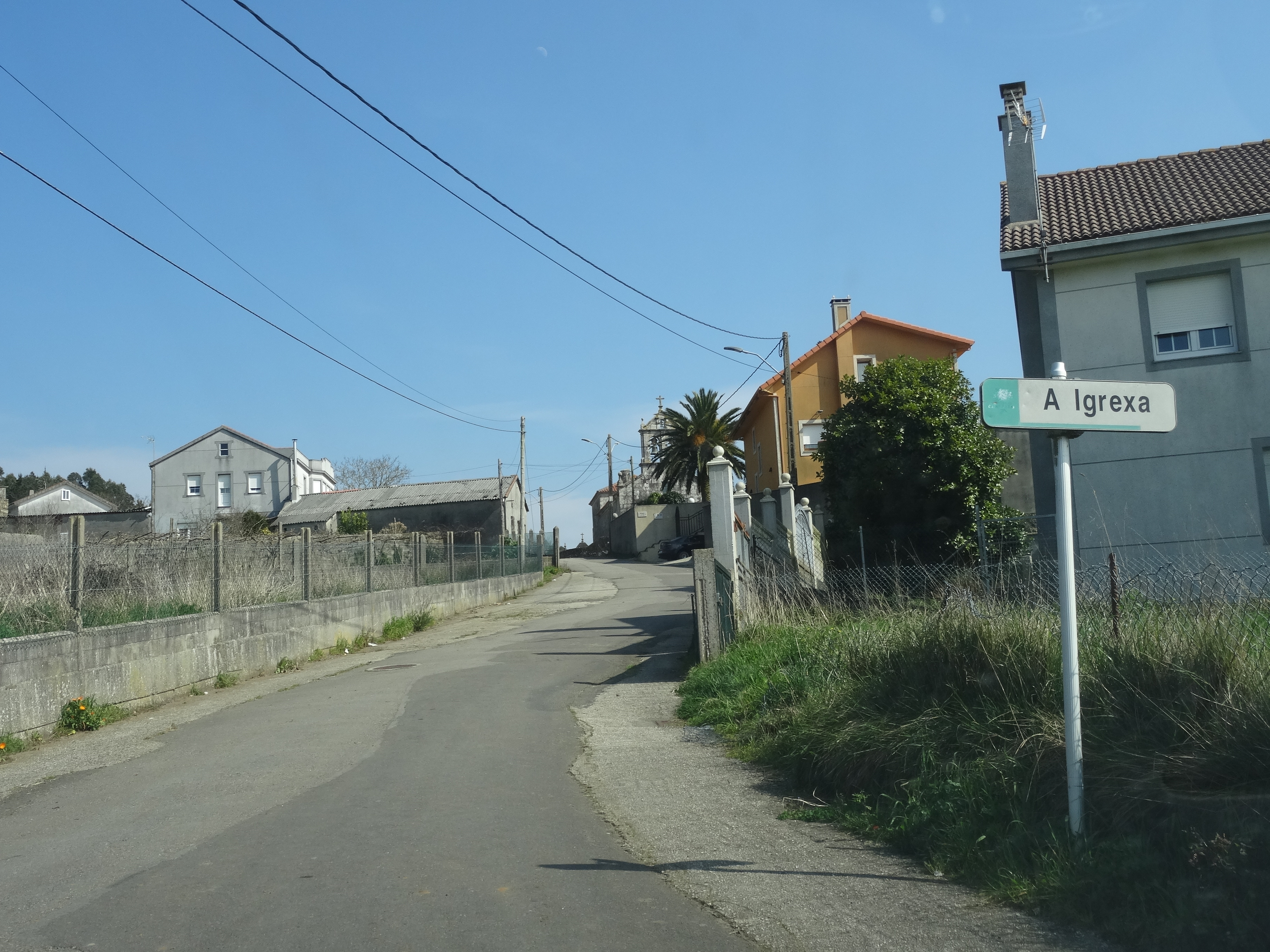 Lugar da Igrexa na parroquia de Oza, Carballo.